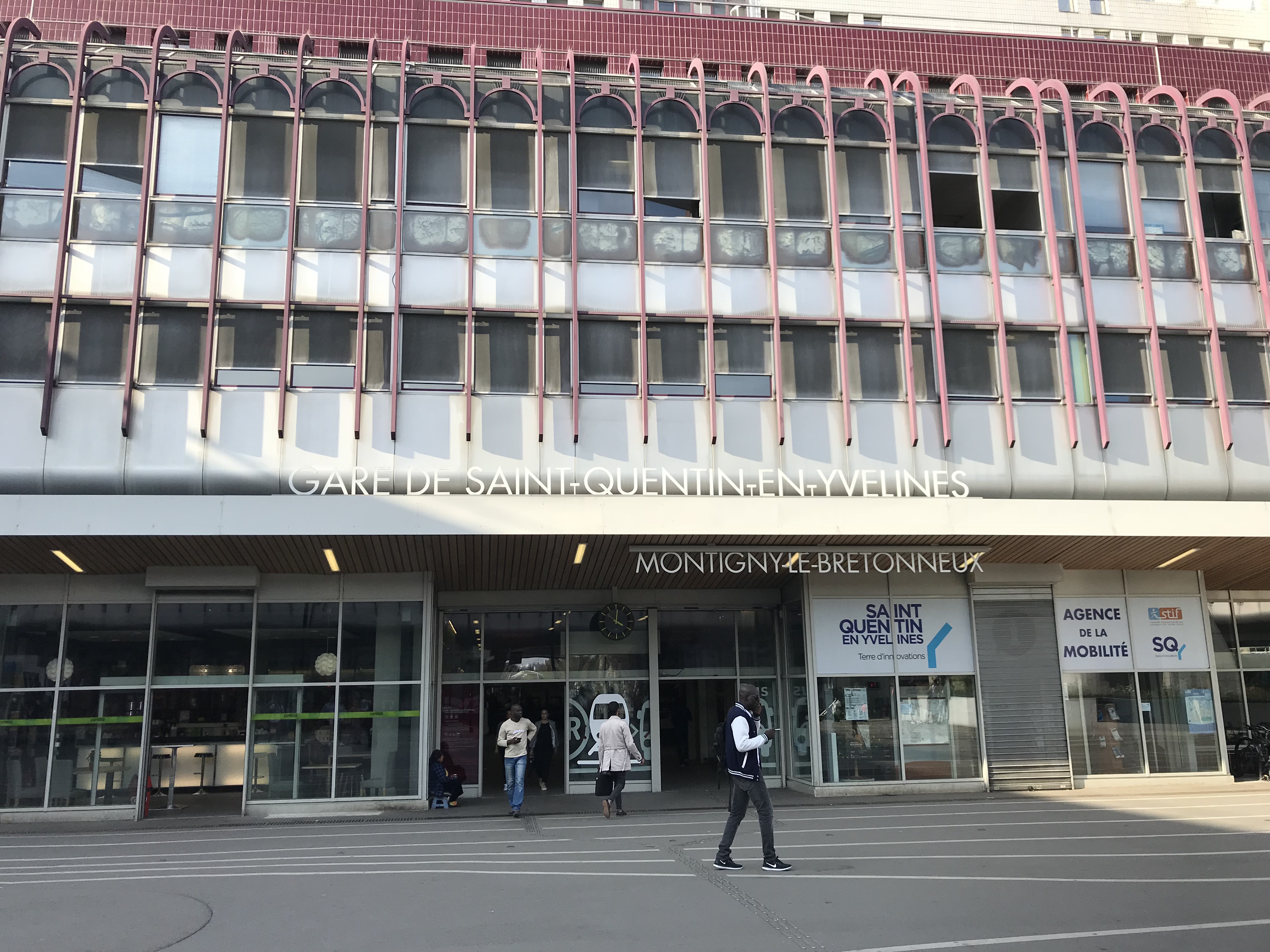 Gare de Saint-Quentin-en-Yvelines - Accès Sud